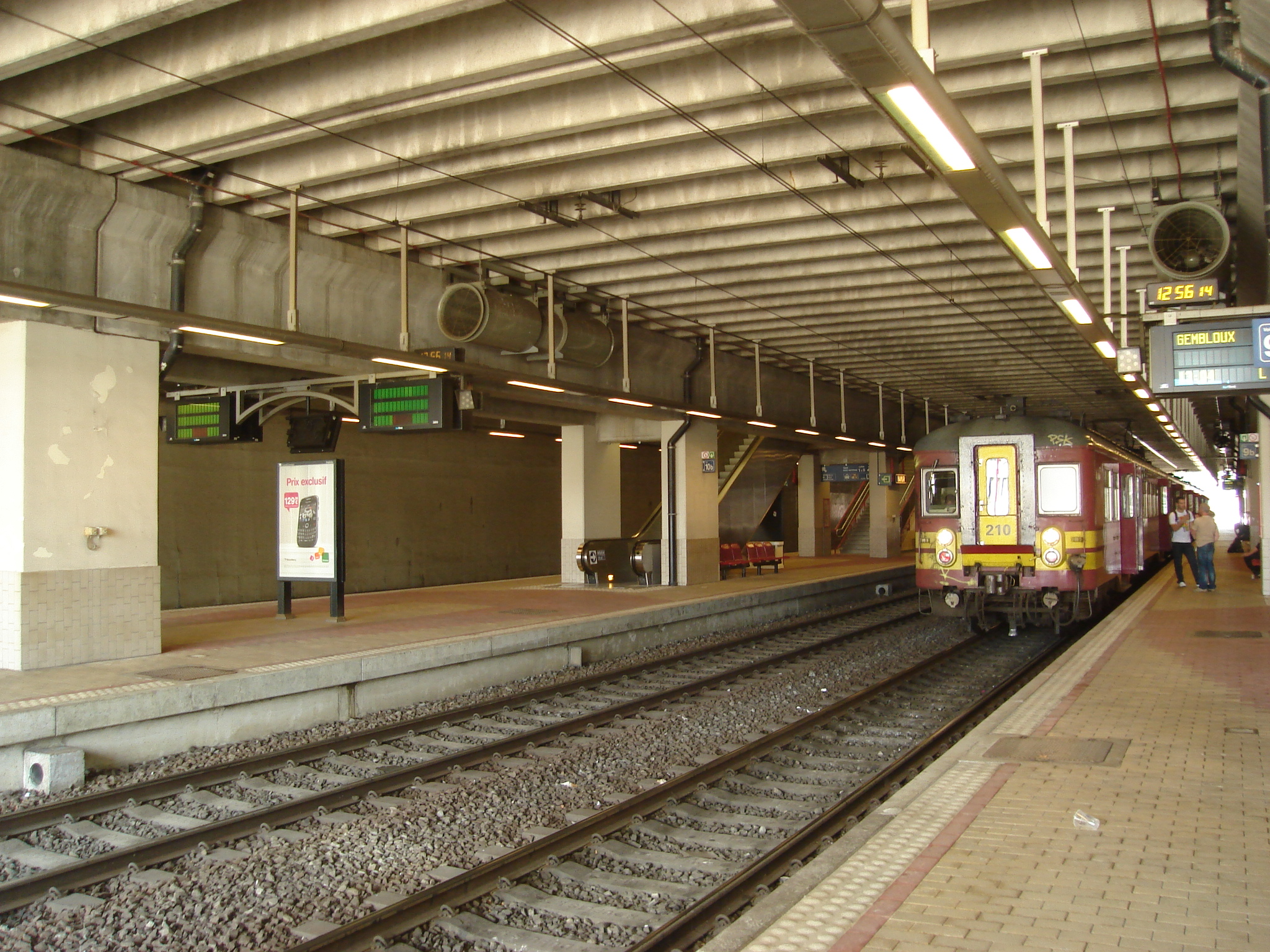 Quais de la gare de Namur (photo prise depuis le quai 9).